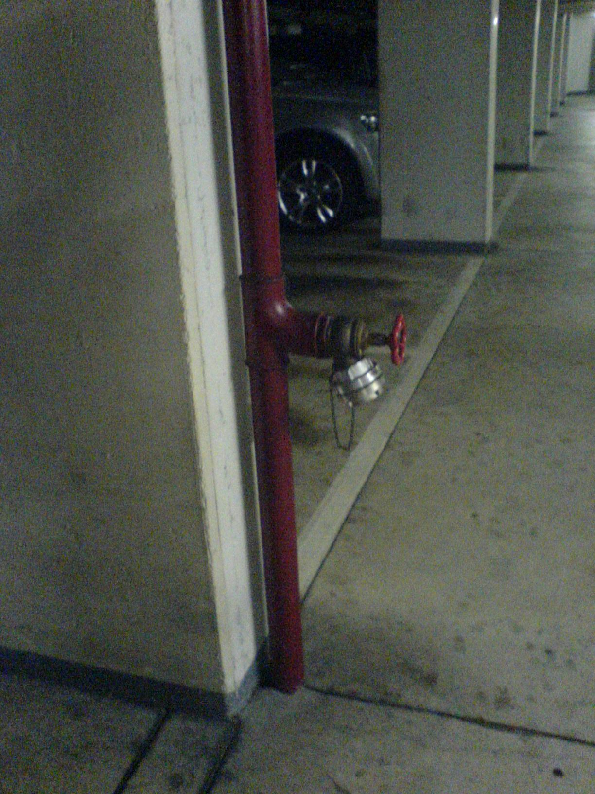 L'arrivée d'une colonne sèche au 2e sous-sol du quai Gustave-Ador 54 à Genève, avec une sortie Storz 55. Photo prise par PsychoMessiah avec un Sony Ericsson K750i.